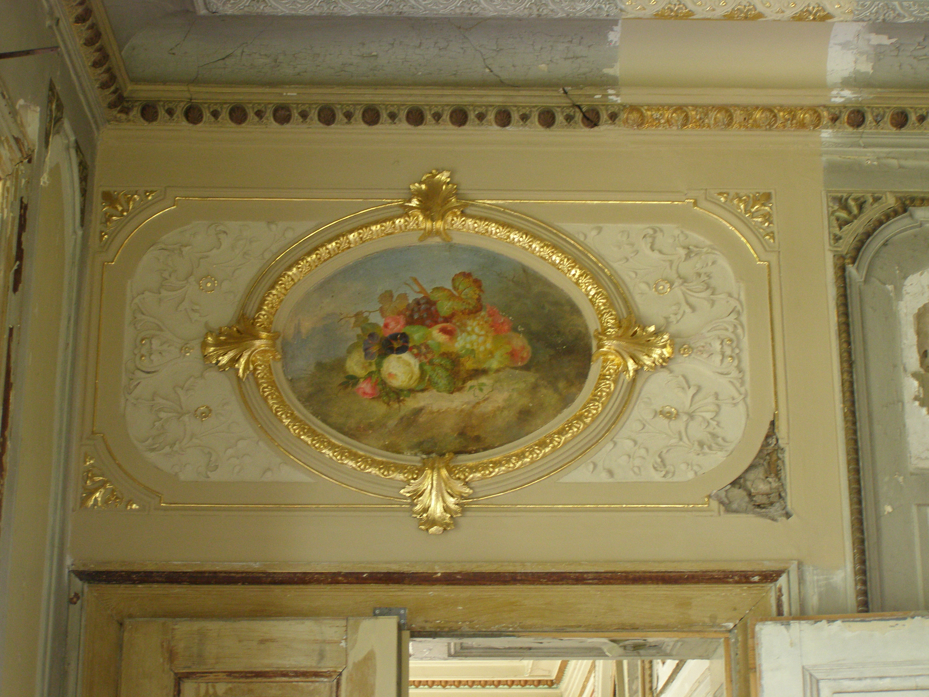 Exemplarisch restauriertes Detail (Supraporte) im Festsaal der Villa Büchner, Pfungstadt